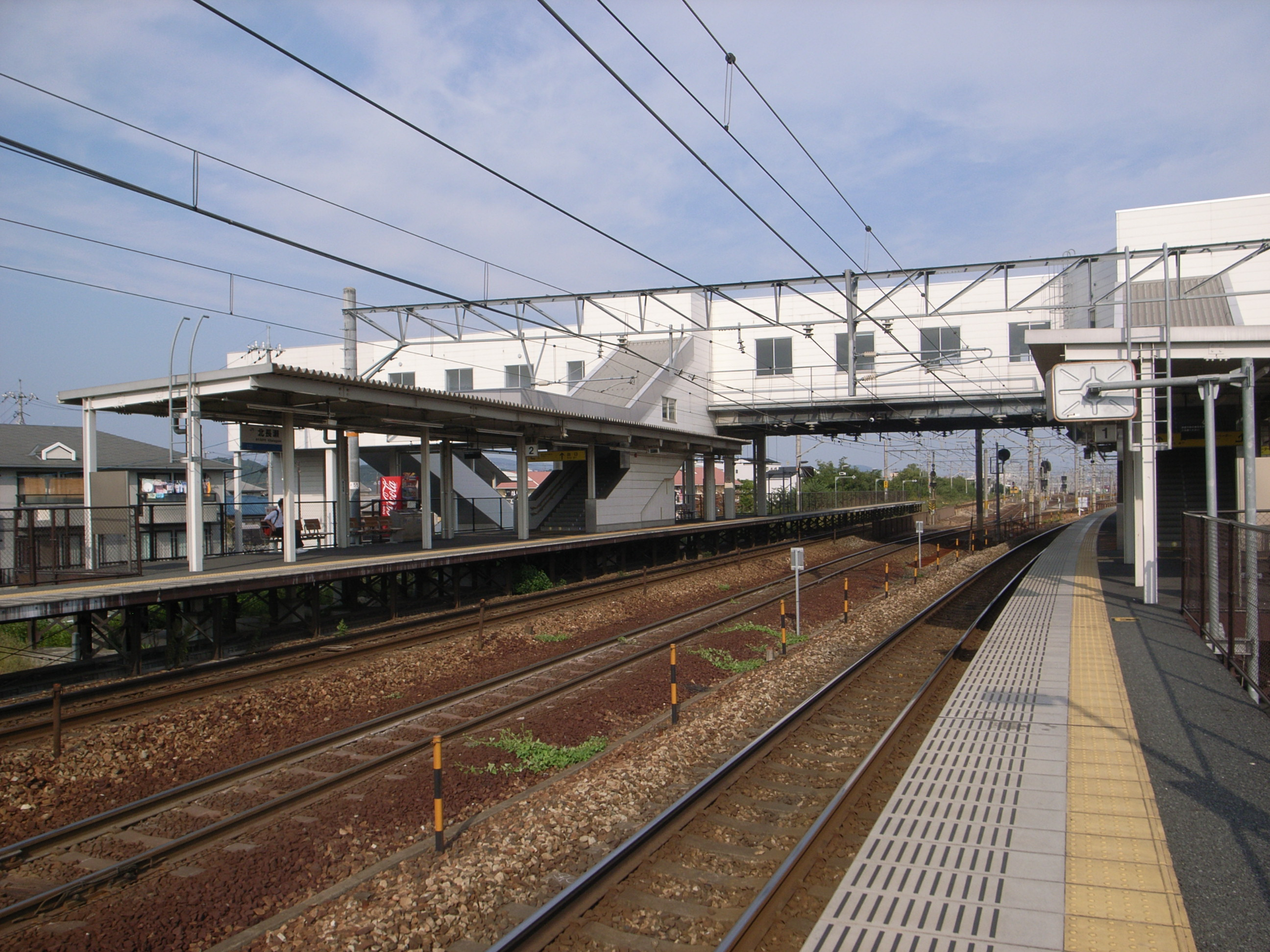 山陽本線北長瀬駅プラットホーム